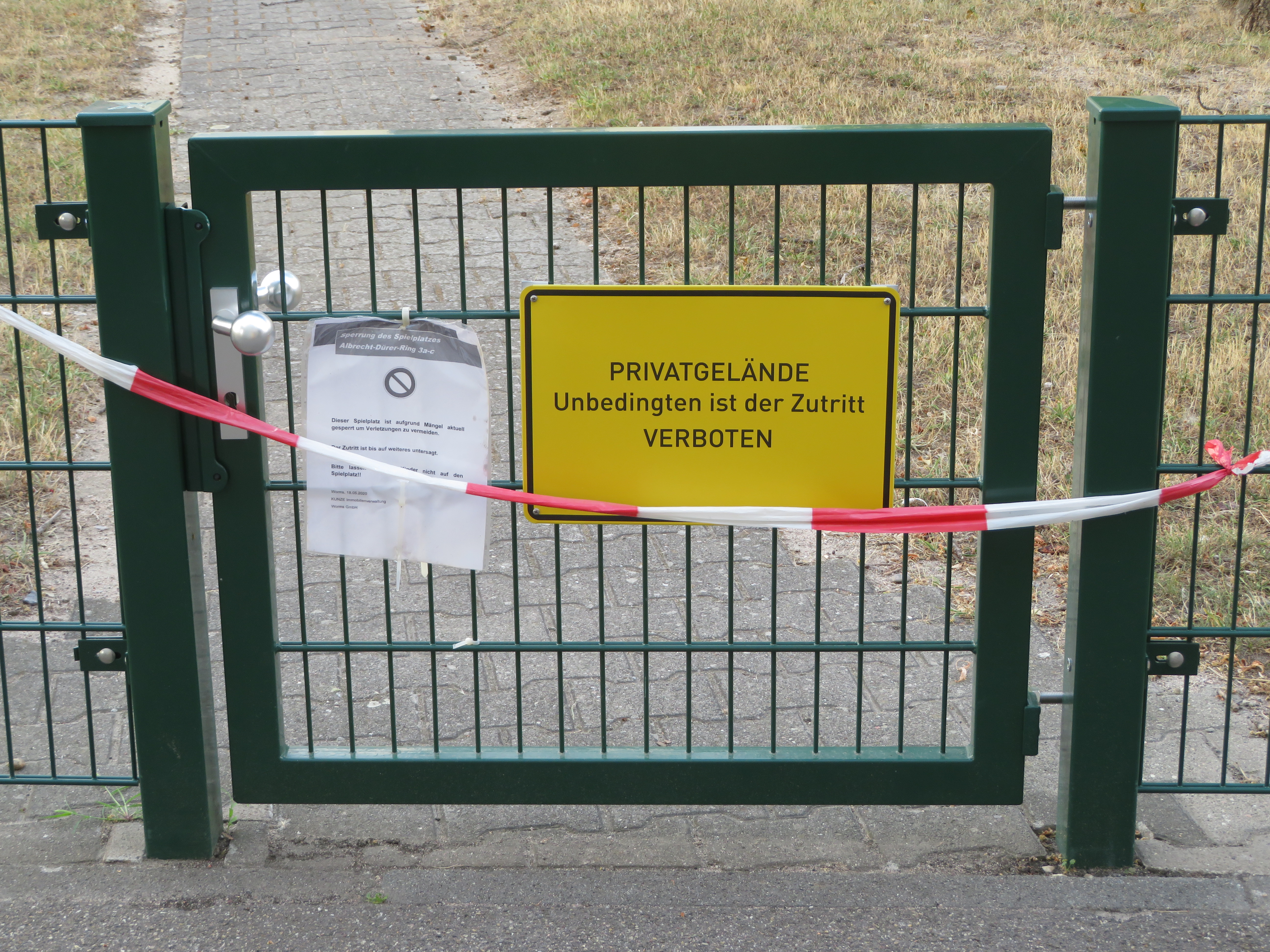 Von einer Person mit mangelnder Sprachkompetenz im Deutschen in Auftrag gegebenes Schild. Der Hersteller im Schilderladen machte offenbar keinen Korrekturvorschlag.